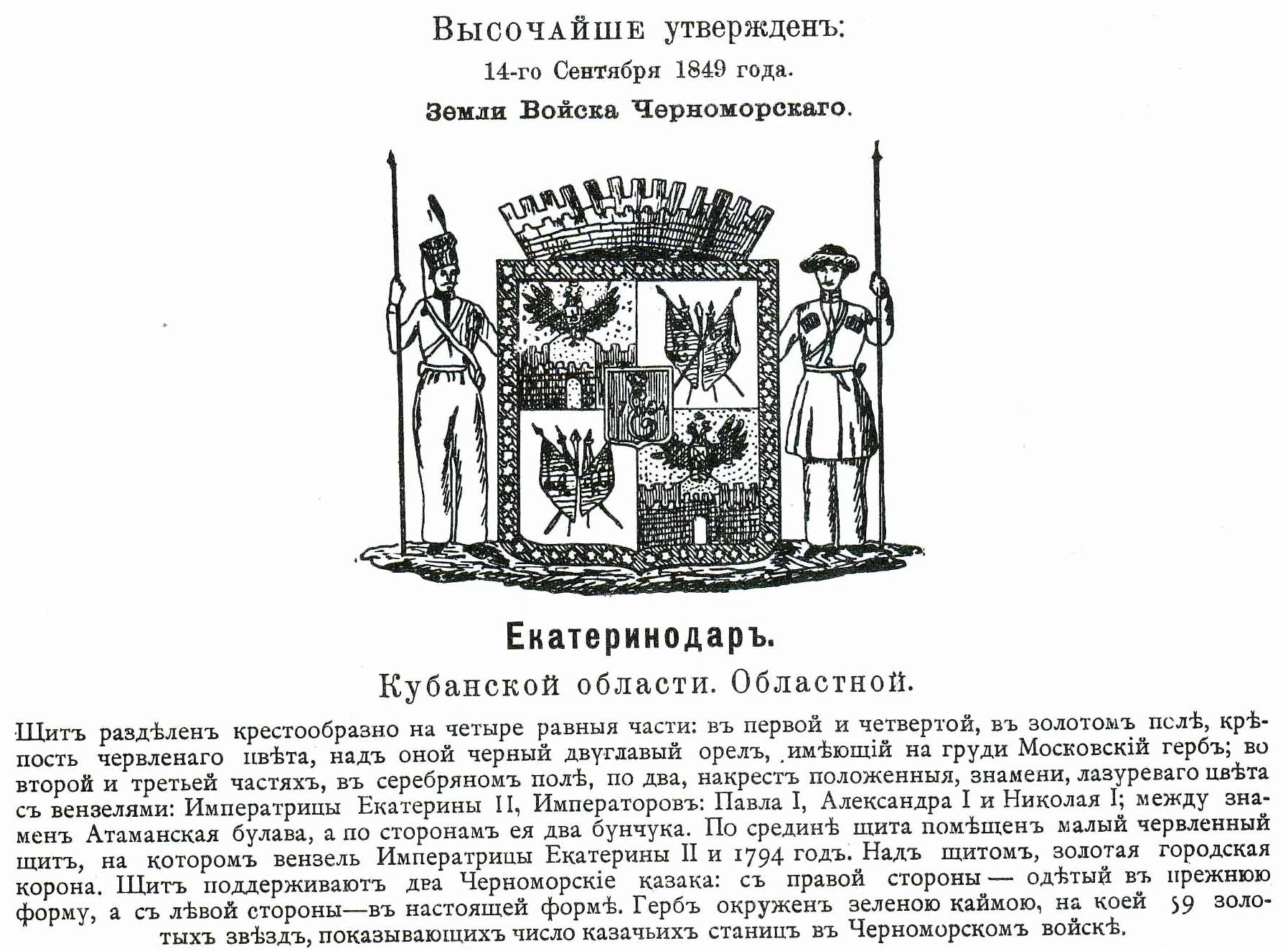 Official Russian Empire coat of arms Ekaterinodar. Герб Российской Империи областного города Екатеринодар Кубанской области с официальным описанием в Гербовнике Винклера.